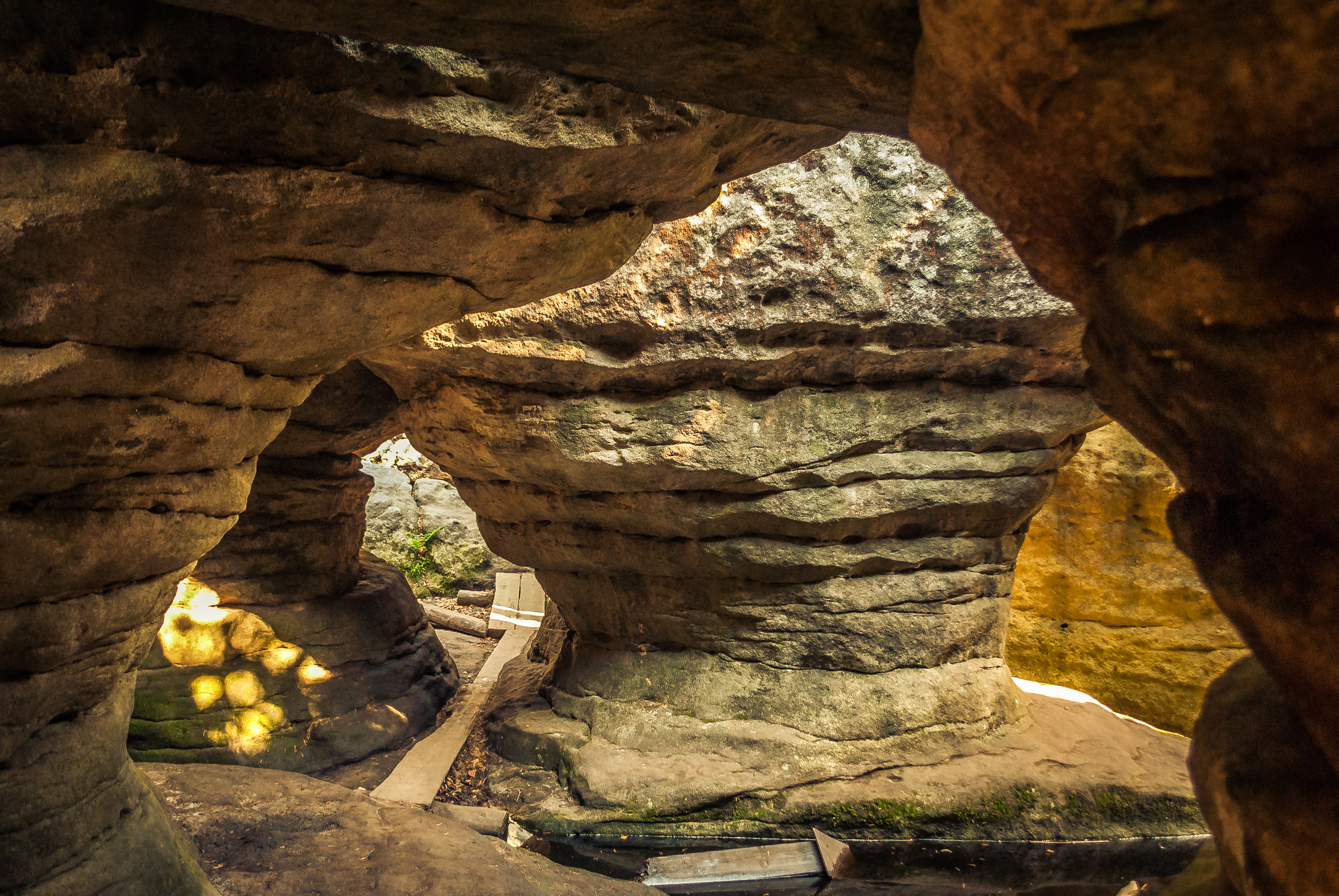 Obszar specjalnej ochrony ptaków Góry Stołowe. This is a photography of Natura 2000 protected area with ID PLB020006